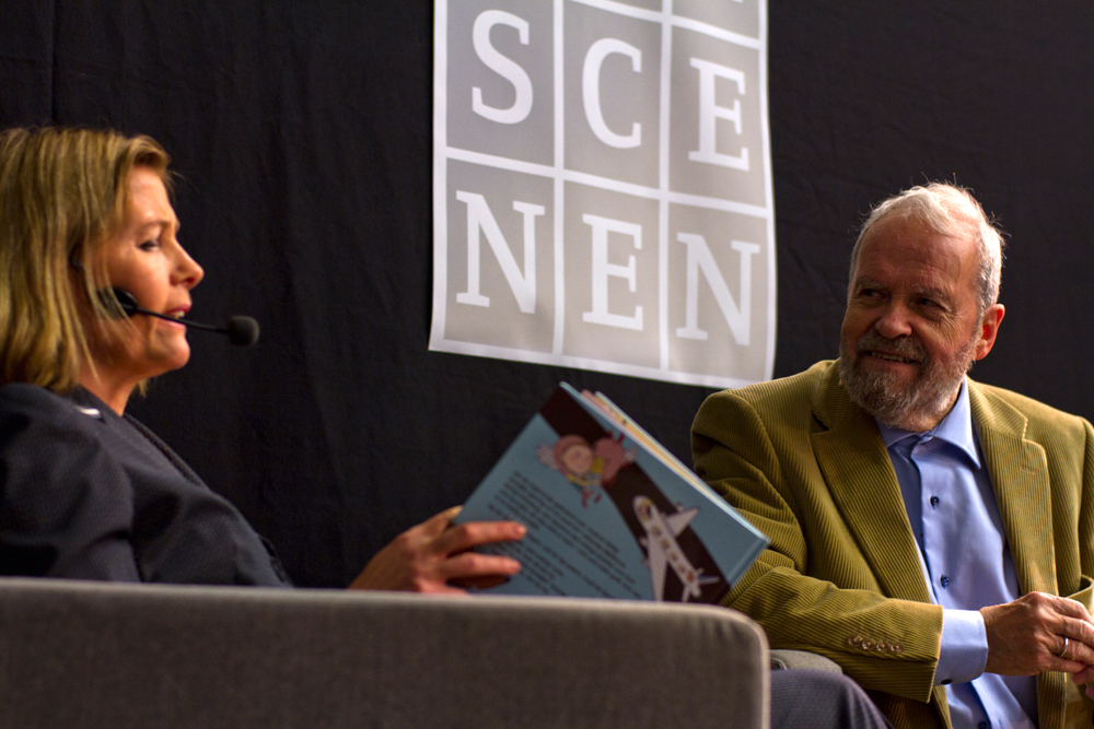 Johannes Møllehave interviewes af Anna Libak til Bogforum 2011Unknown danish author and priest johannes møllehave, at the danish book fair "bogforum 2011"